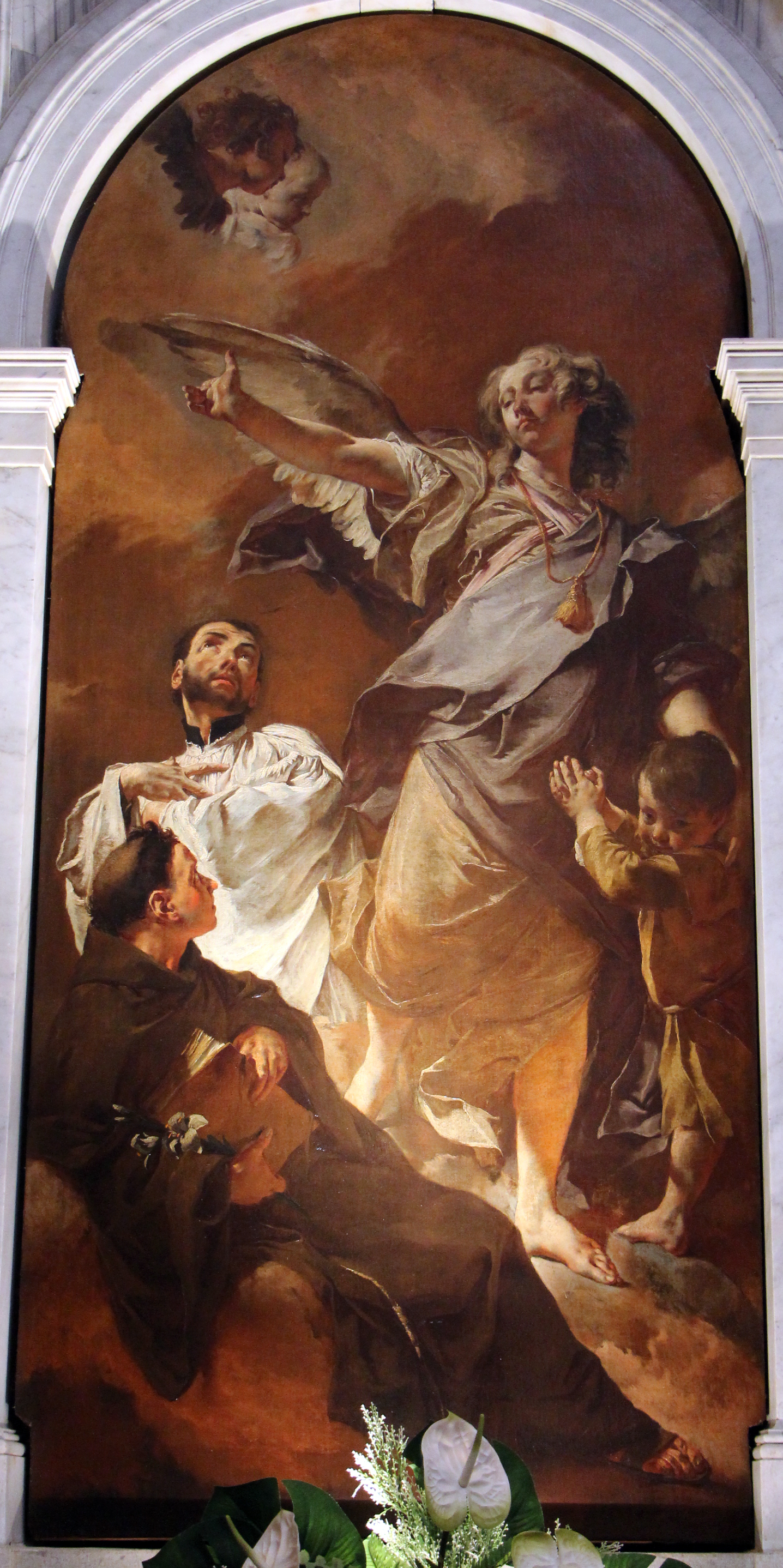 Venezia